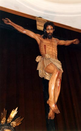 Cristo del Perdon de Huelva